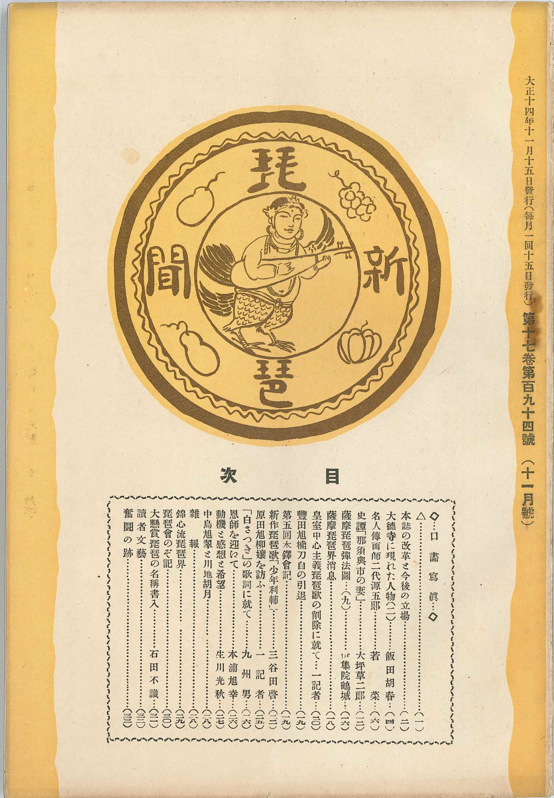 琵琶新聞 第194号(大正14年11月) 琵琶新聞社刊